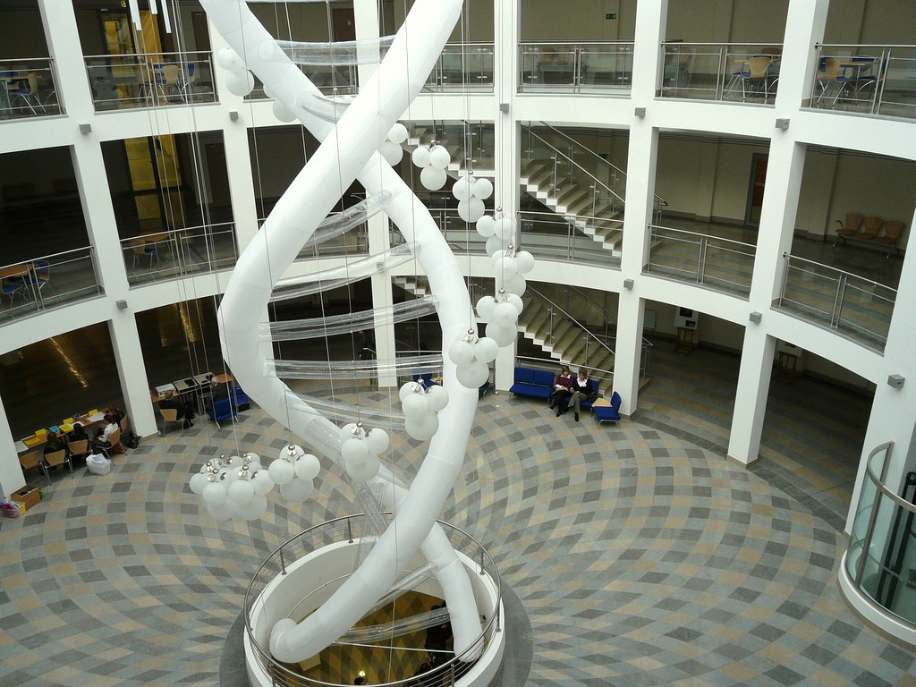 Gdańsk Oliwa. Uniwersytet Gdański, Wydział Nauk Społecznych.